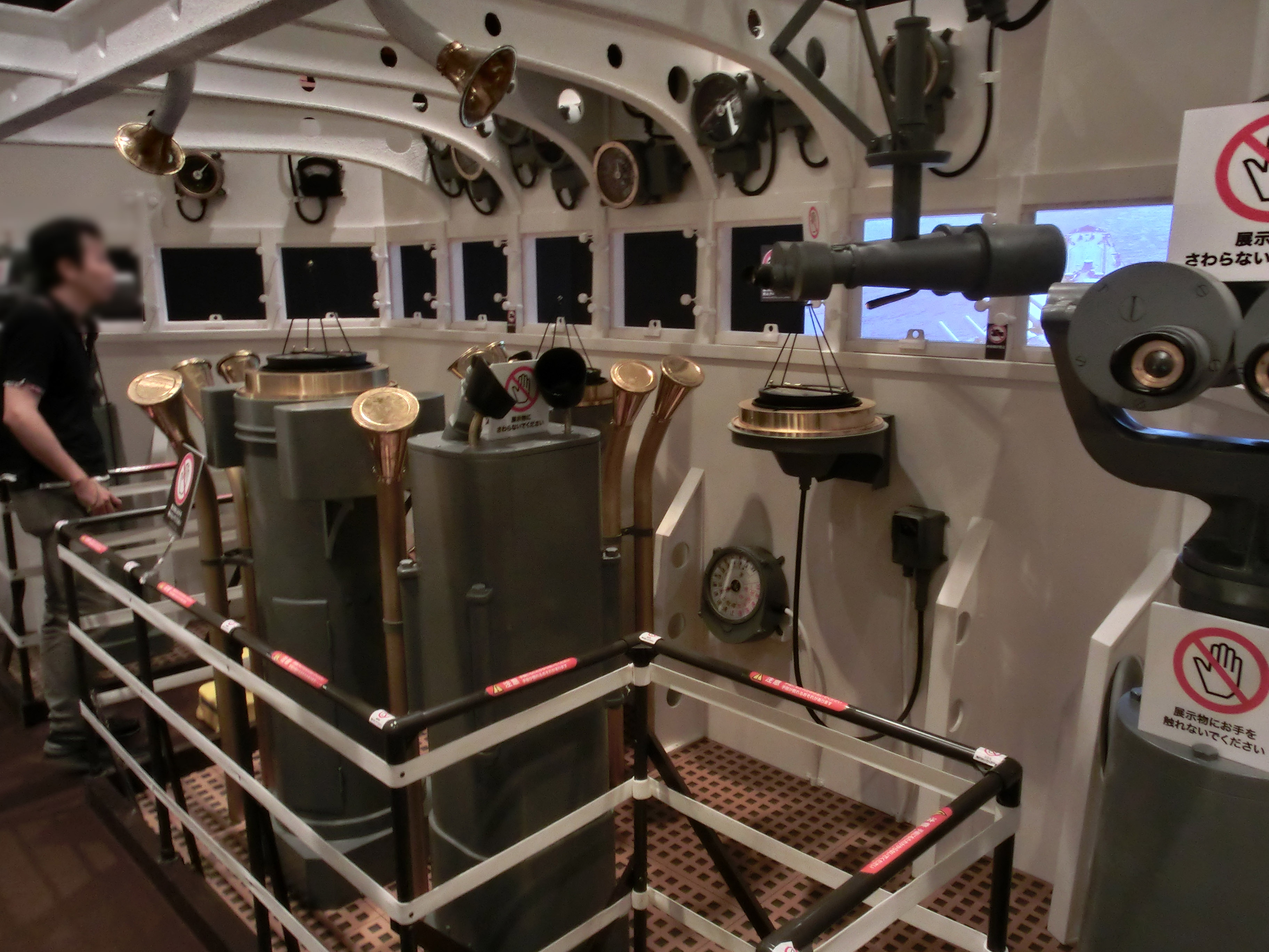 大和の艦橋 復元モデルセット、呉海事博物館2013年8月。企画展示で制作された。その後解体され、他地域でも展示が行われた。2017年現在は、呉海事博物館には展示されていない。